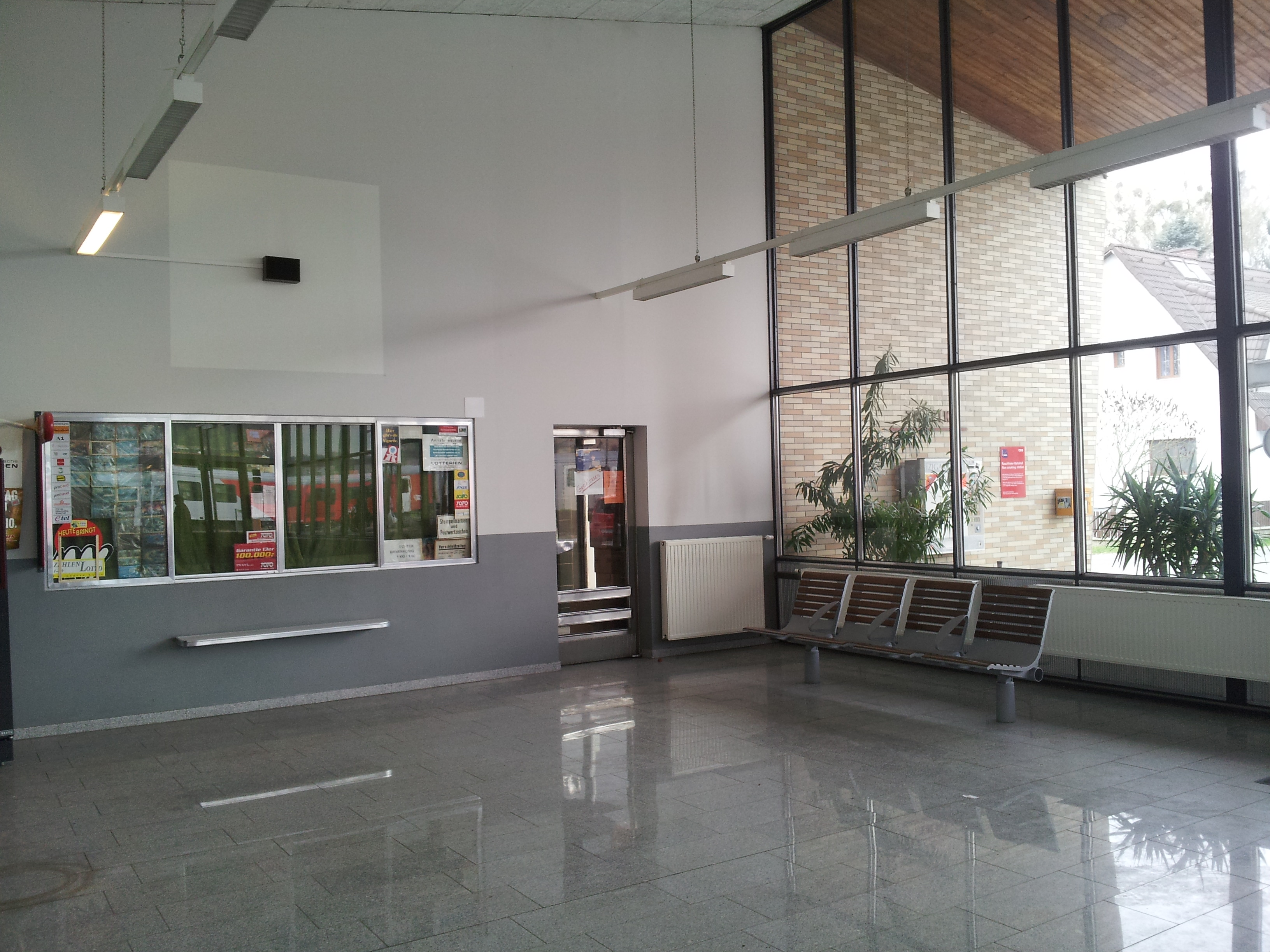 Bahnhof Fehring